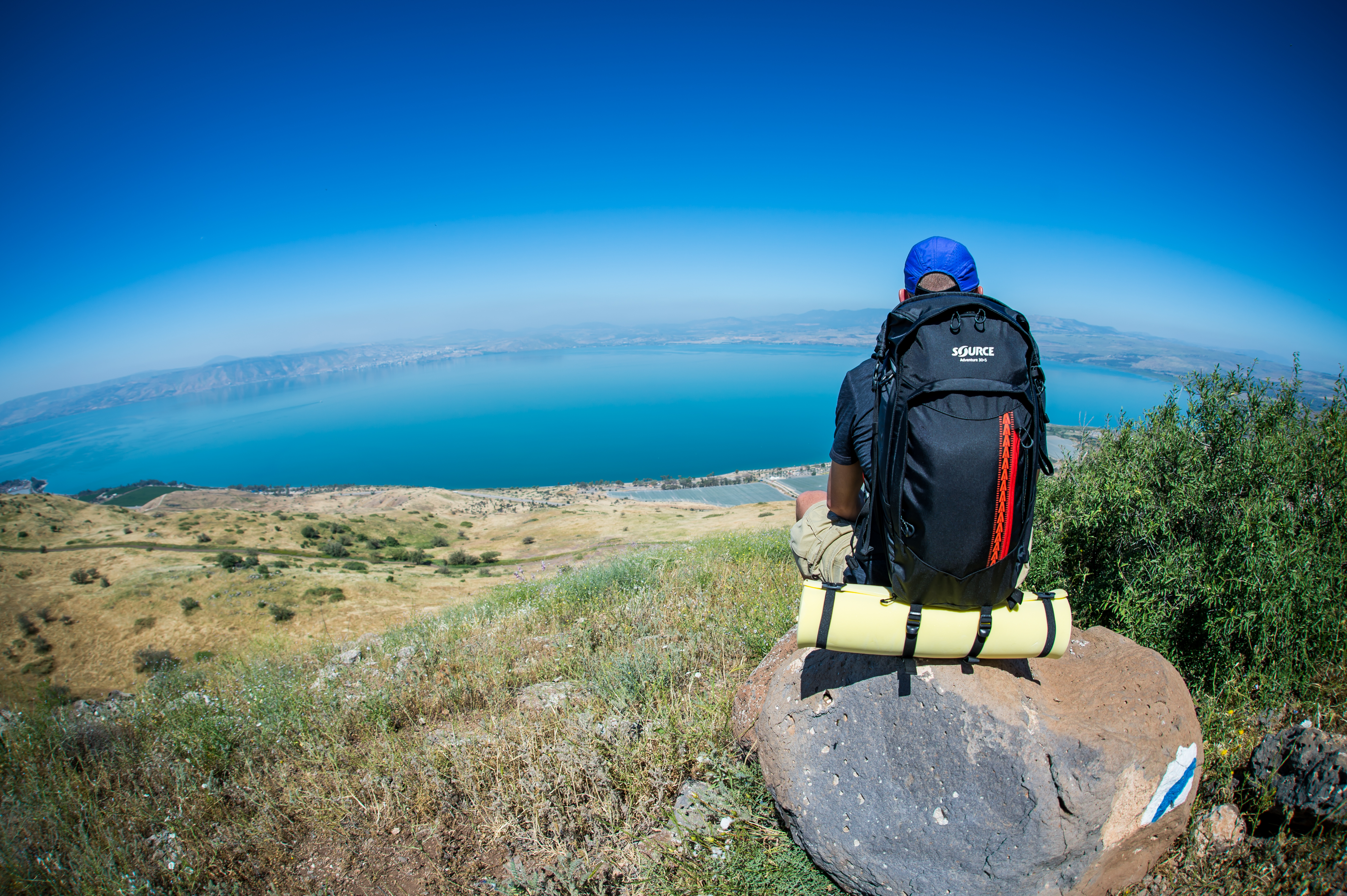 תיק של חברת שורש